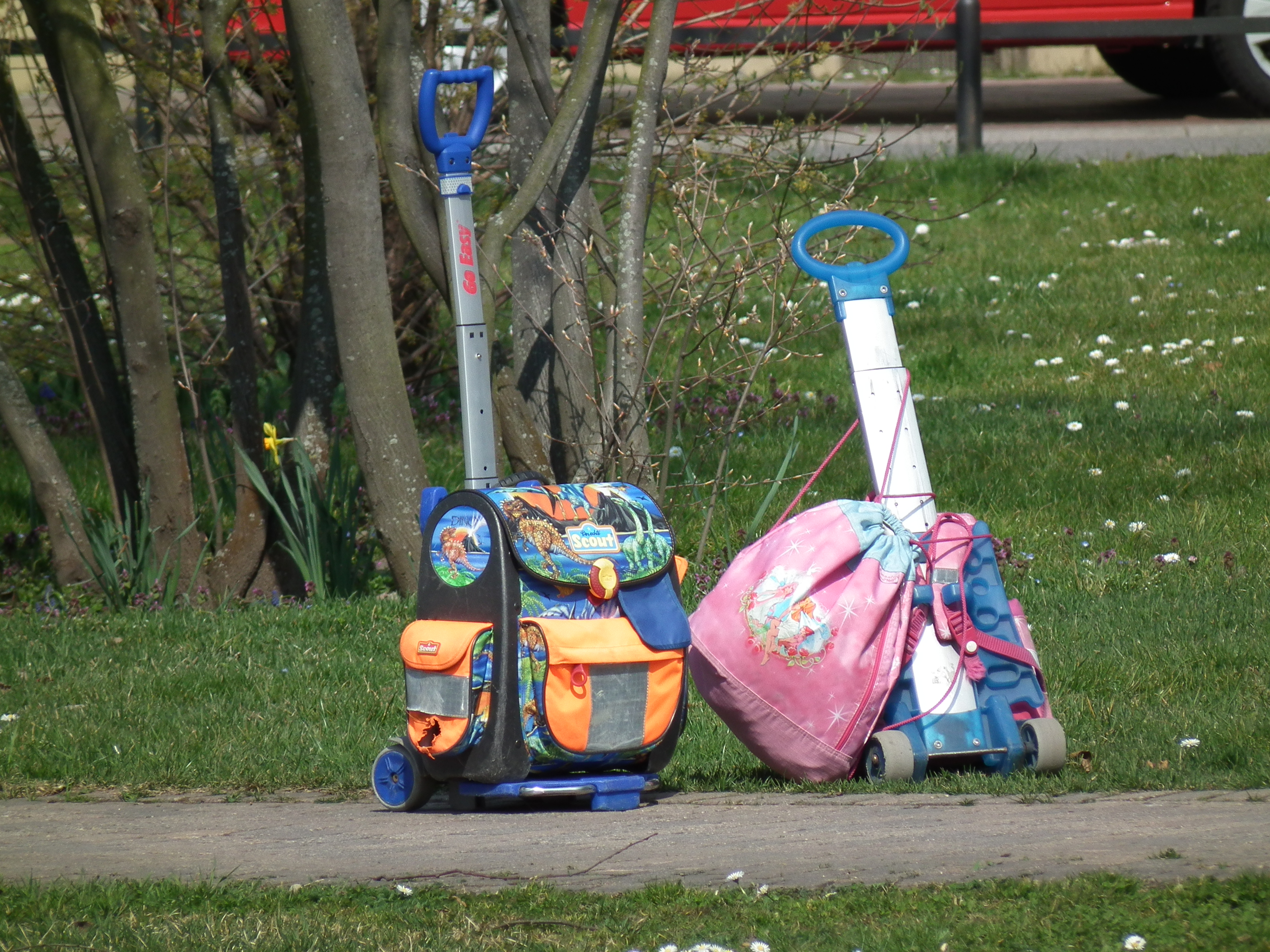 Go easy on trolley für Schulranzen